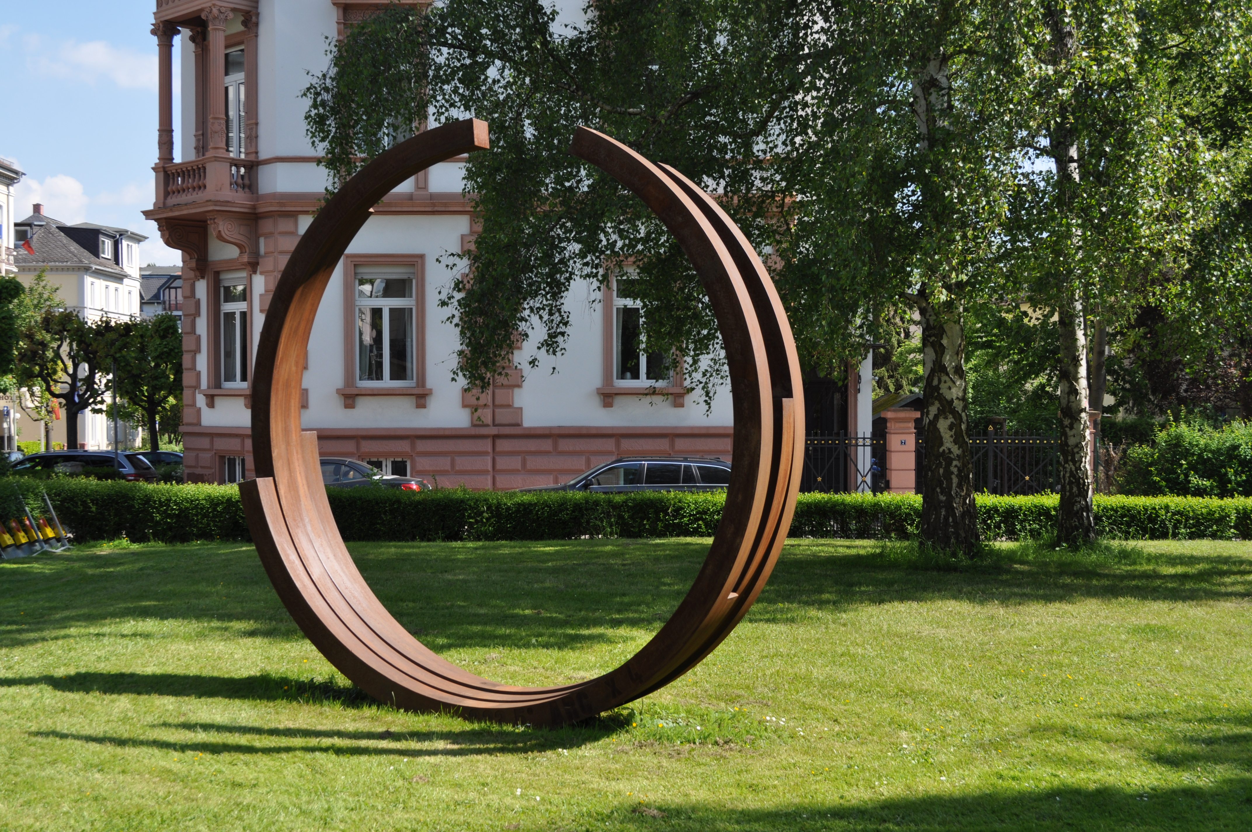 Skulptur 233.5° Arc x 4 von Bernar Venet aus dem Jahr 1999. Die Skulptur war Teil der Blickachsen 8 und steht heute auf dem Ferdinandsplatz in Bad Homburg